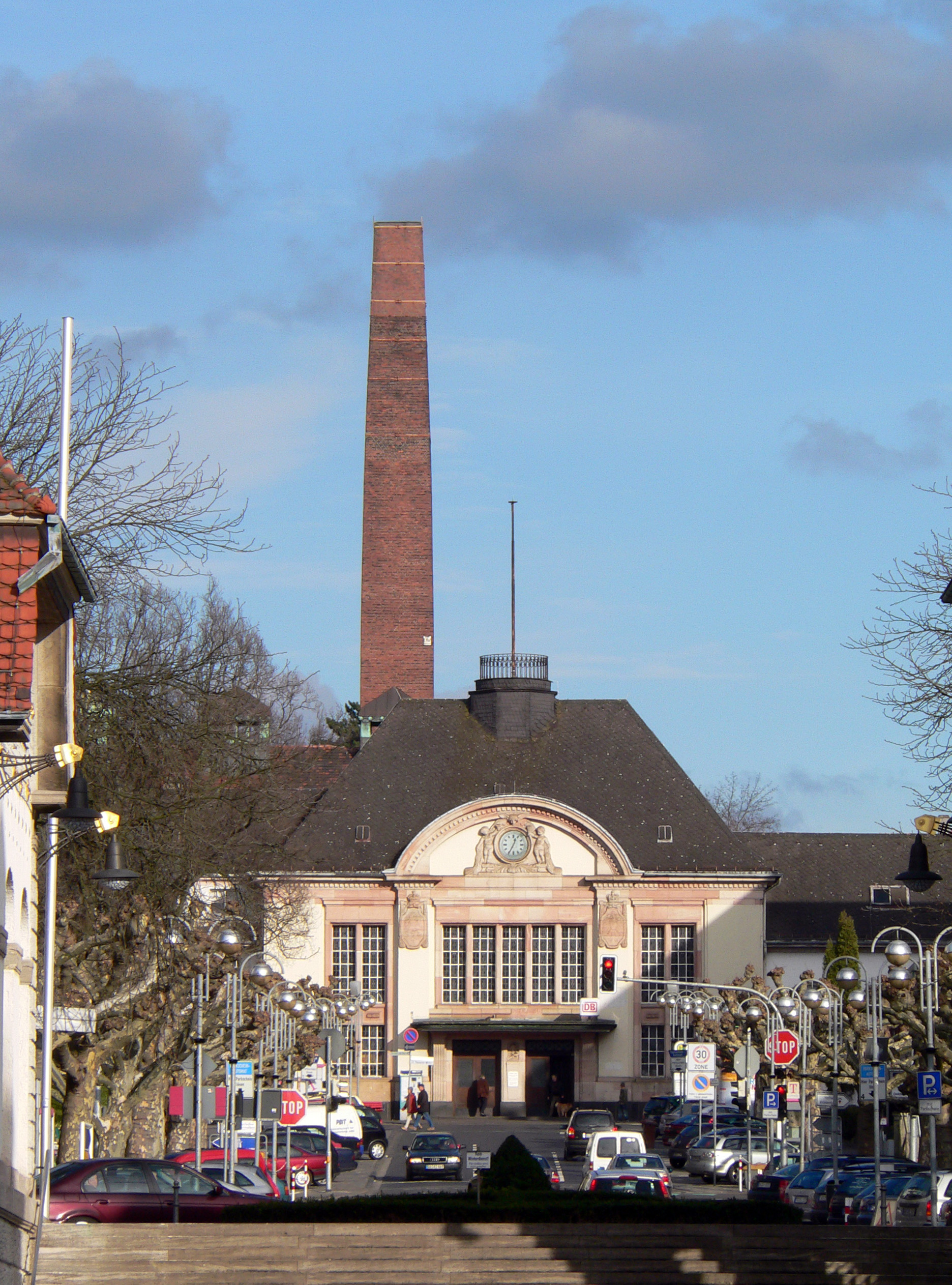 Bahnhof Bad Nauheim, vom Sprudelhof aus gesehen